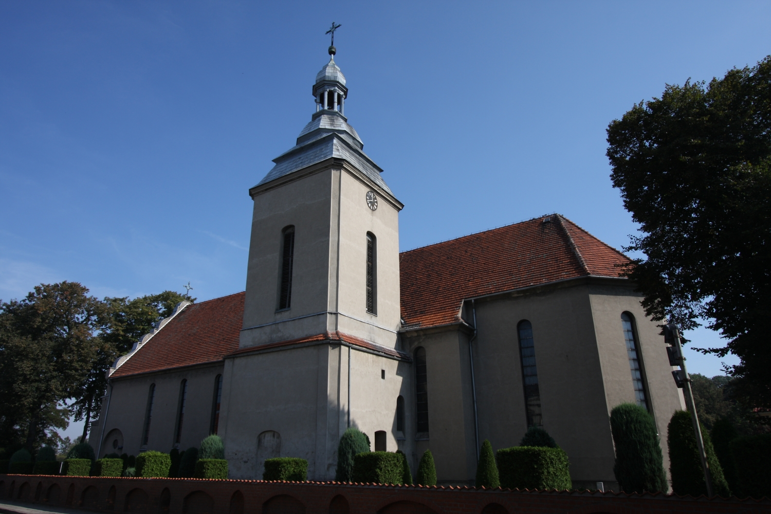 Wielichowo, kościół par. p.w. św. Marii Magdaleny, mur., 1762-1779